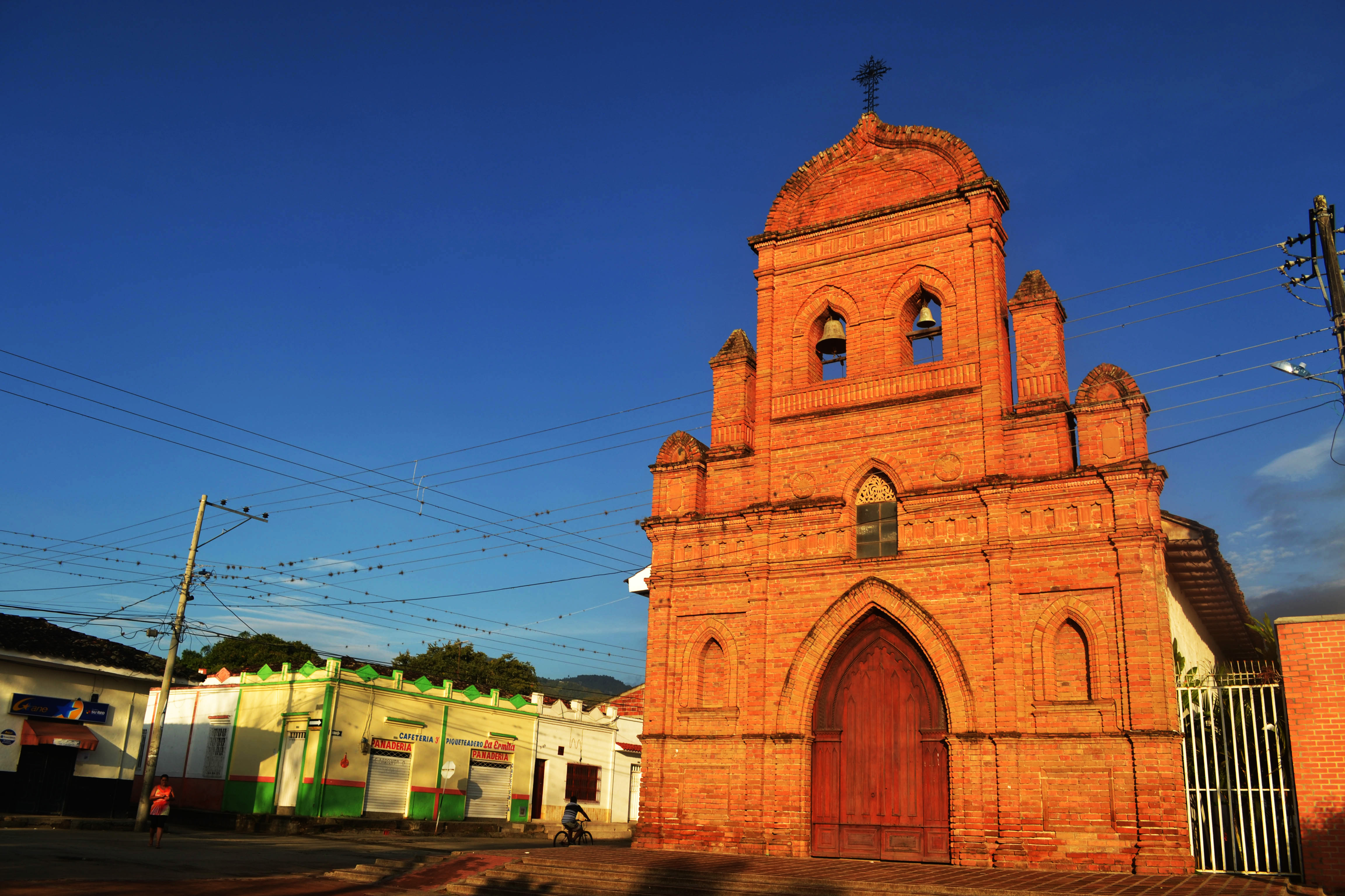 La versión inicial de la Capilla de la Ermita de Roldanillo, data del siglo XVII, y está considerada como una de las obras de arquitectura religiosa más representativa de la corriente popular vallecaucana. Consagrada a la virgen del Rosario de Chiquinquirá. Ubicada en la Calle 4 con Carrera 8 del municipio de Roldanillo - Valle del Cauca - Colombia